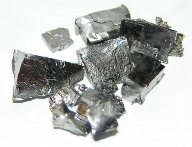 tantalum